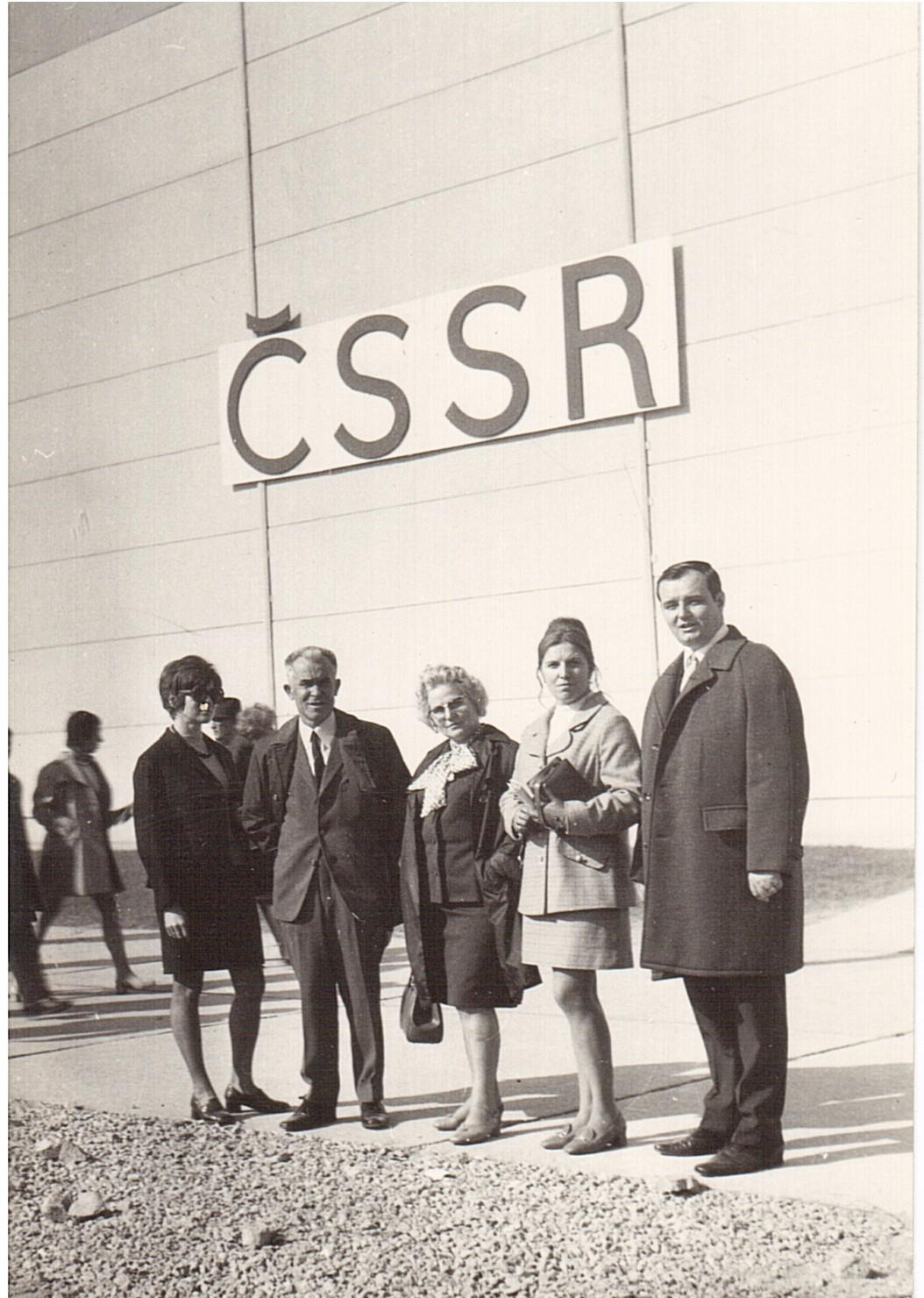 Budapešť expozice podniků ČSSR 1972